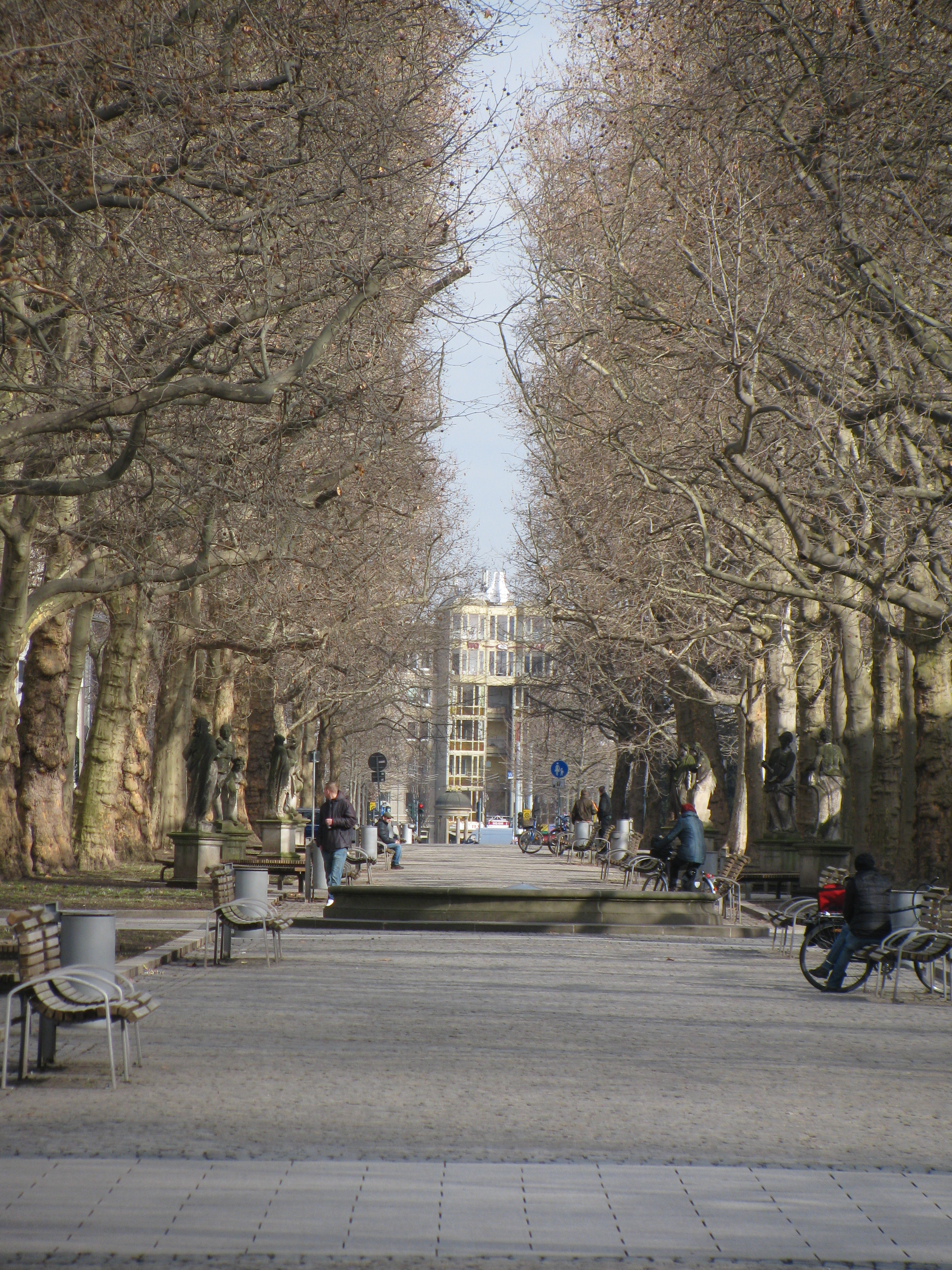 Hauptstraße, Dresden, Blickrichtung Albertplatz